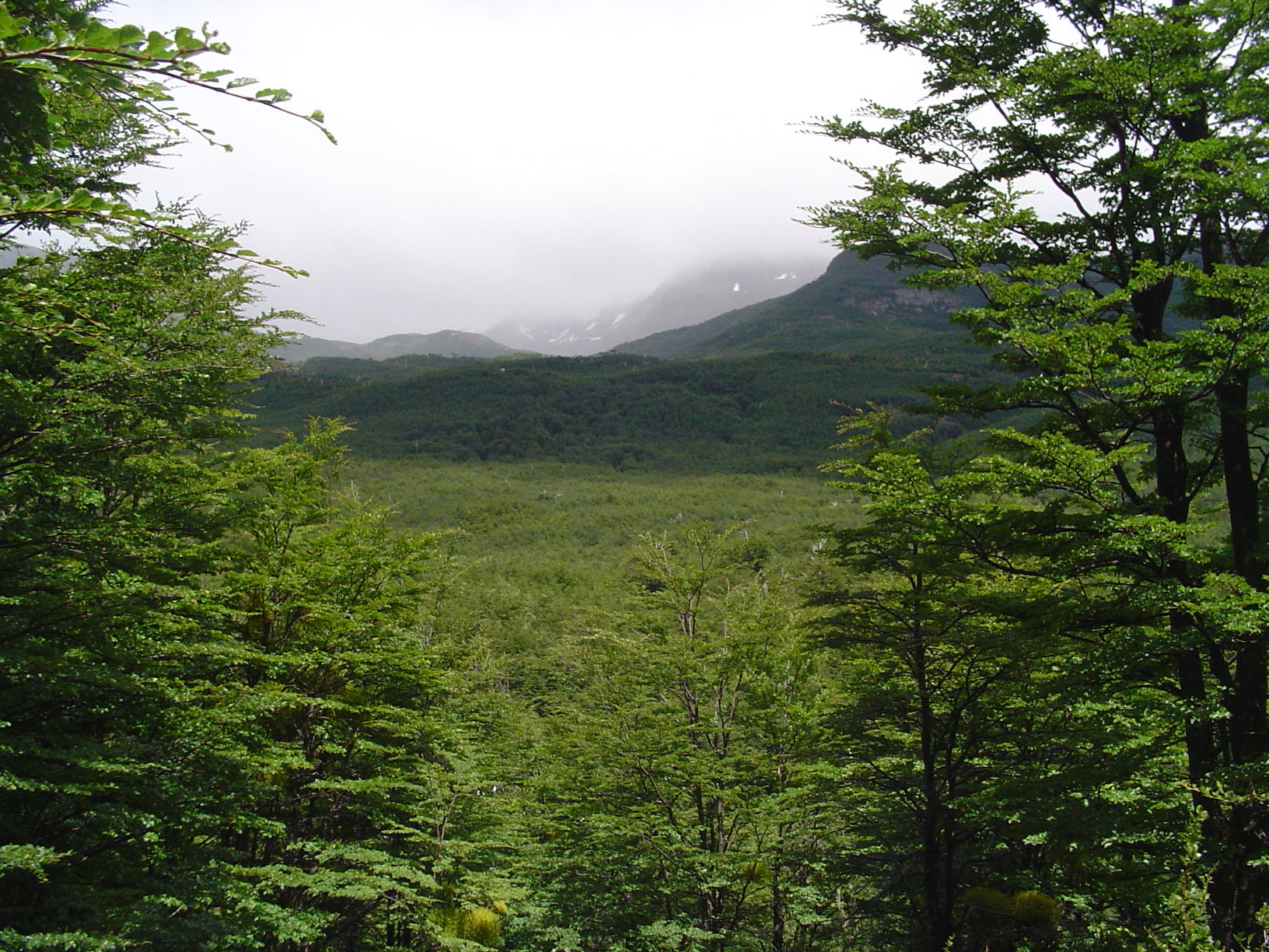 Forêt Magellanique Décidue prise dans le secteur est du parc Torres del Paine